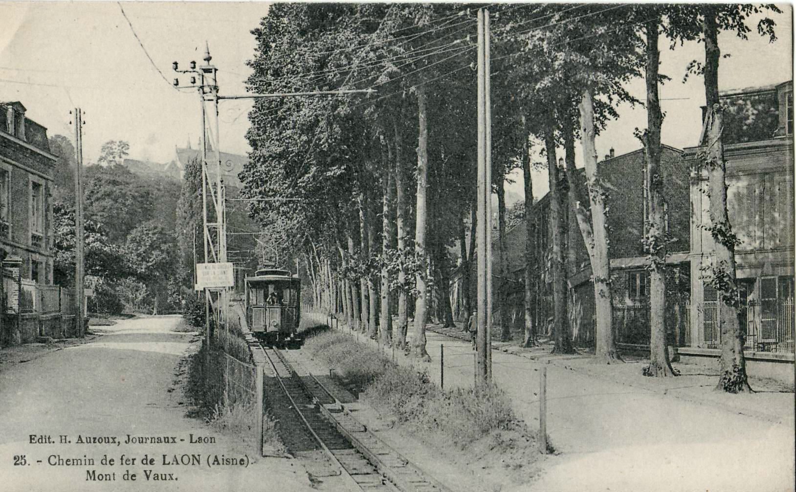 Carte postale ancienne éditée par H. Auroux, journaux à Laon, n°25 : Chemin de fer de LAON - Mont de Vaux